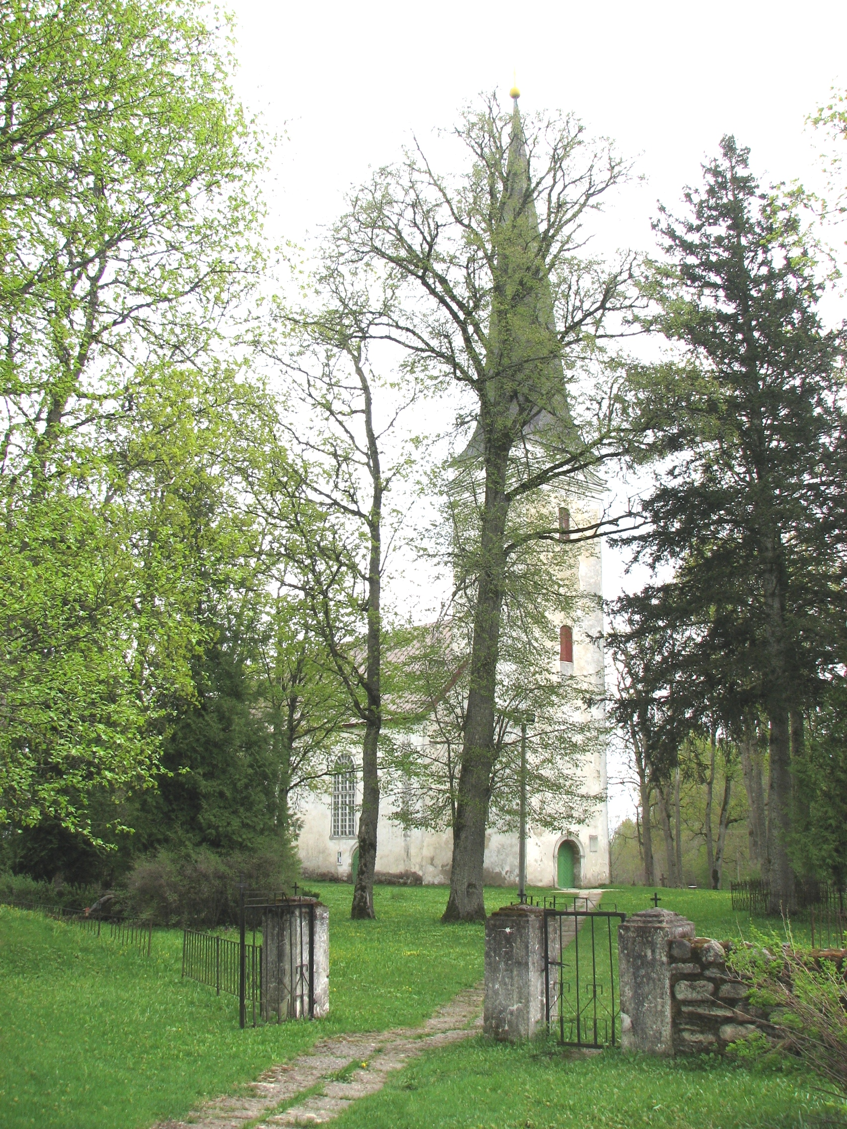 Lääne-Nigula kirik on ehitatud 13. sajandi teisel poolel. 1760 valmis barokse portaaliga nelinurkne läänetorn.